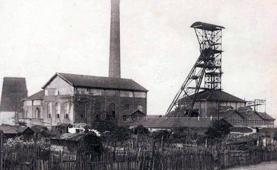 Puits St-Louis, saint-Etienne